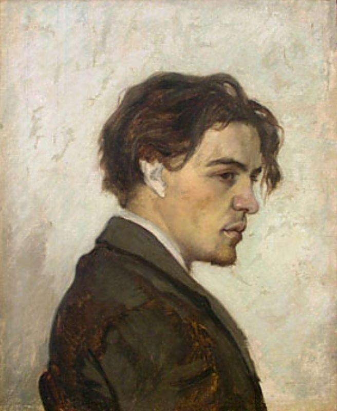 Портрет брата Антона. Холст, масло. Художник Николай Чехов.